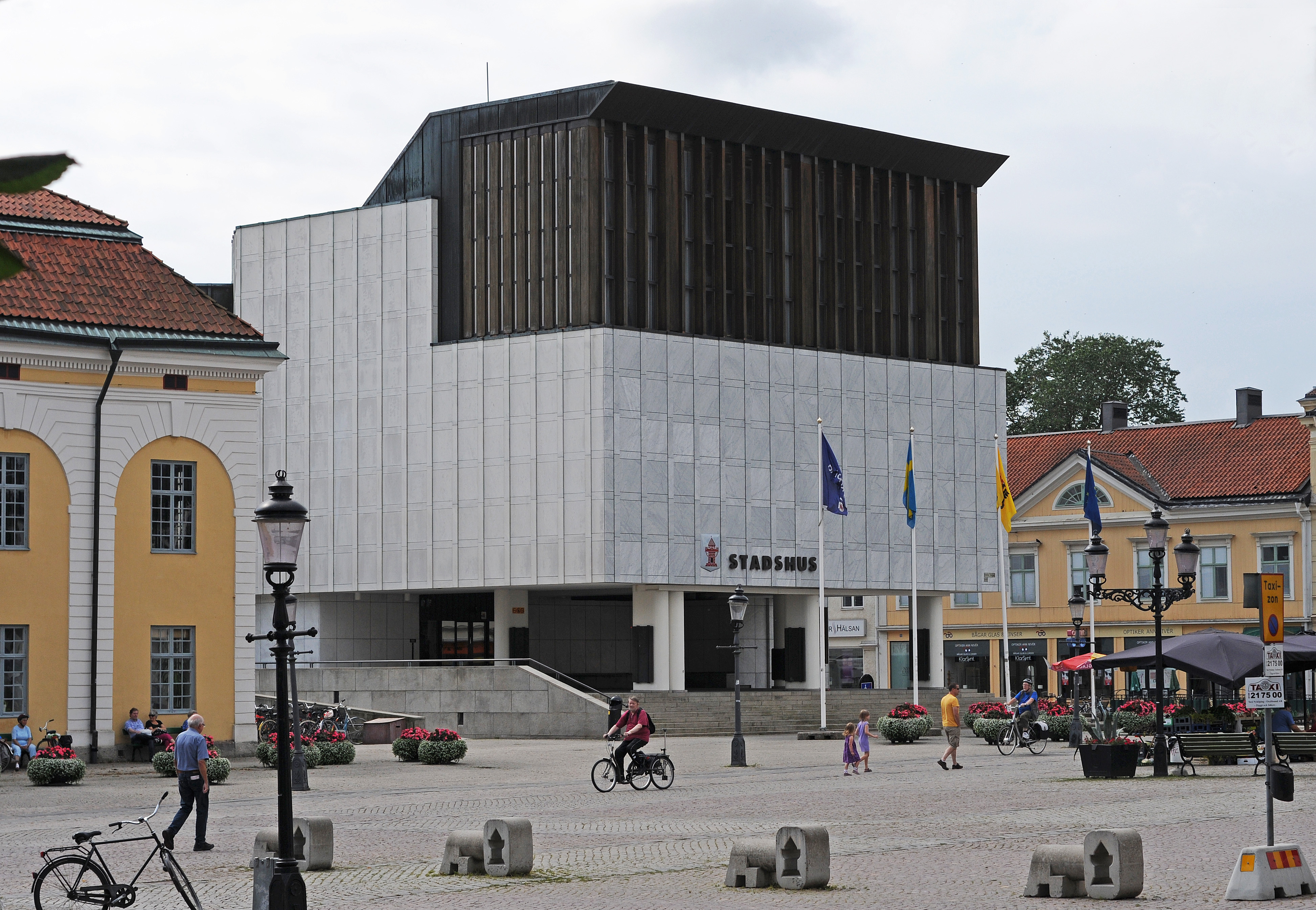 Stadshuset i Nyköping, juli 2011